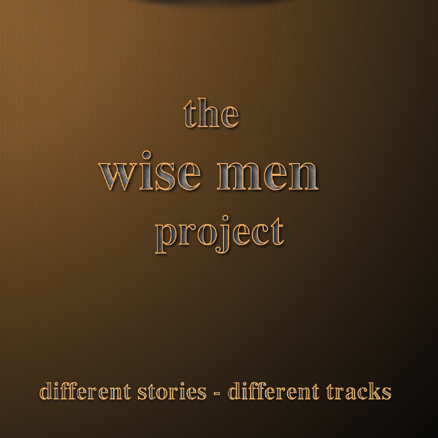 CD-Cover